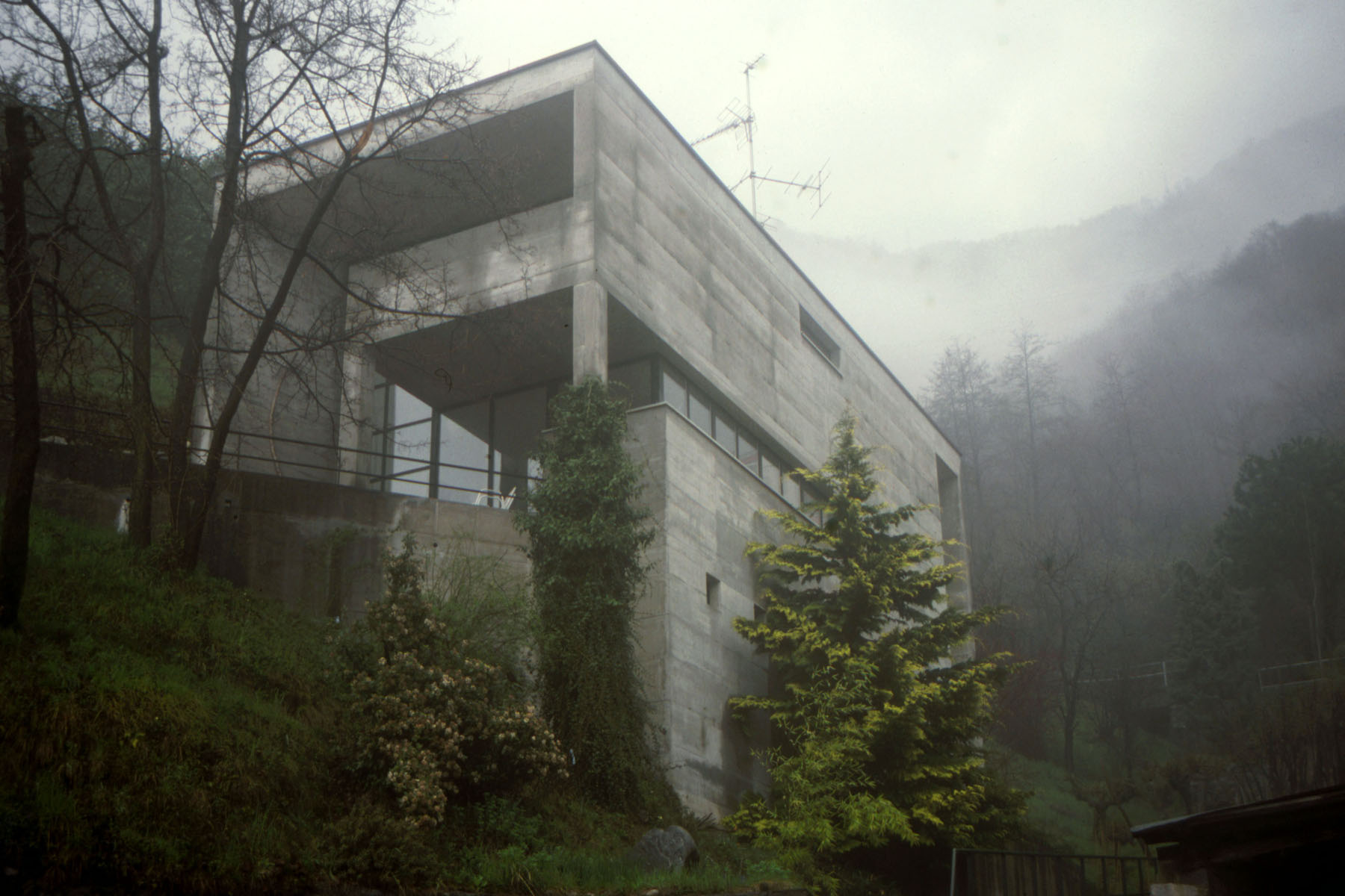 Brione sopra Minusio, Casa Kalmann, arch. Luigi Snozzi 1974-1976